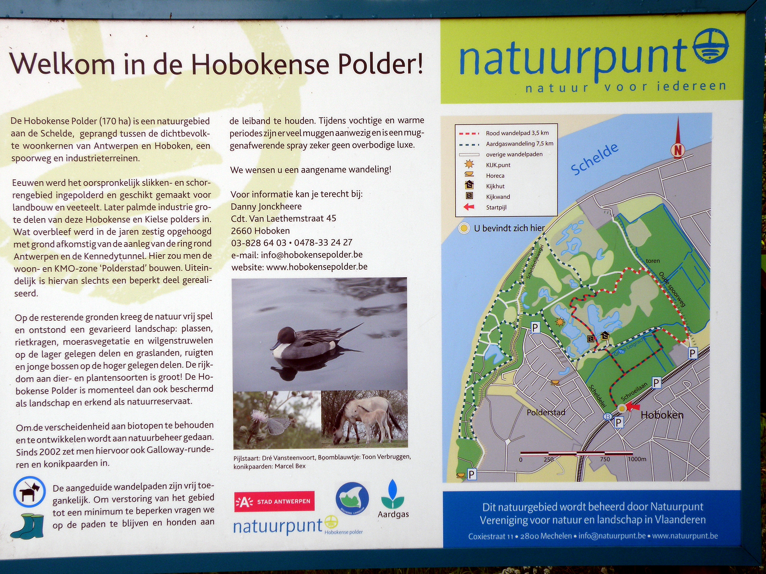 Antwerpen, district Hoboken. Informatiebord aan ingang Hobokense polder (Schroeilaan).